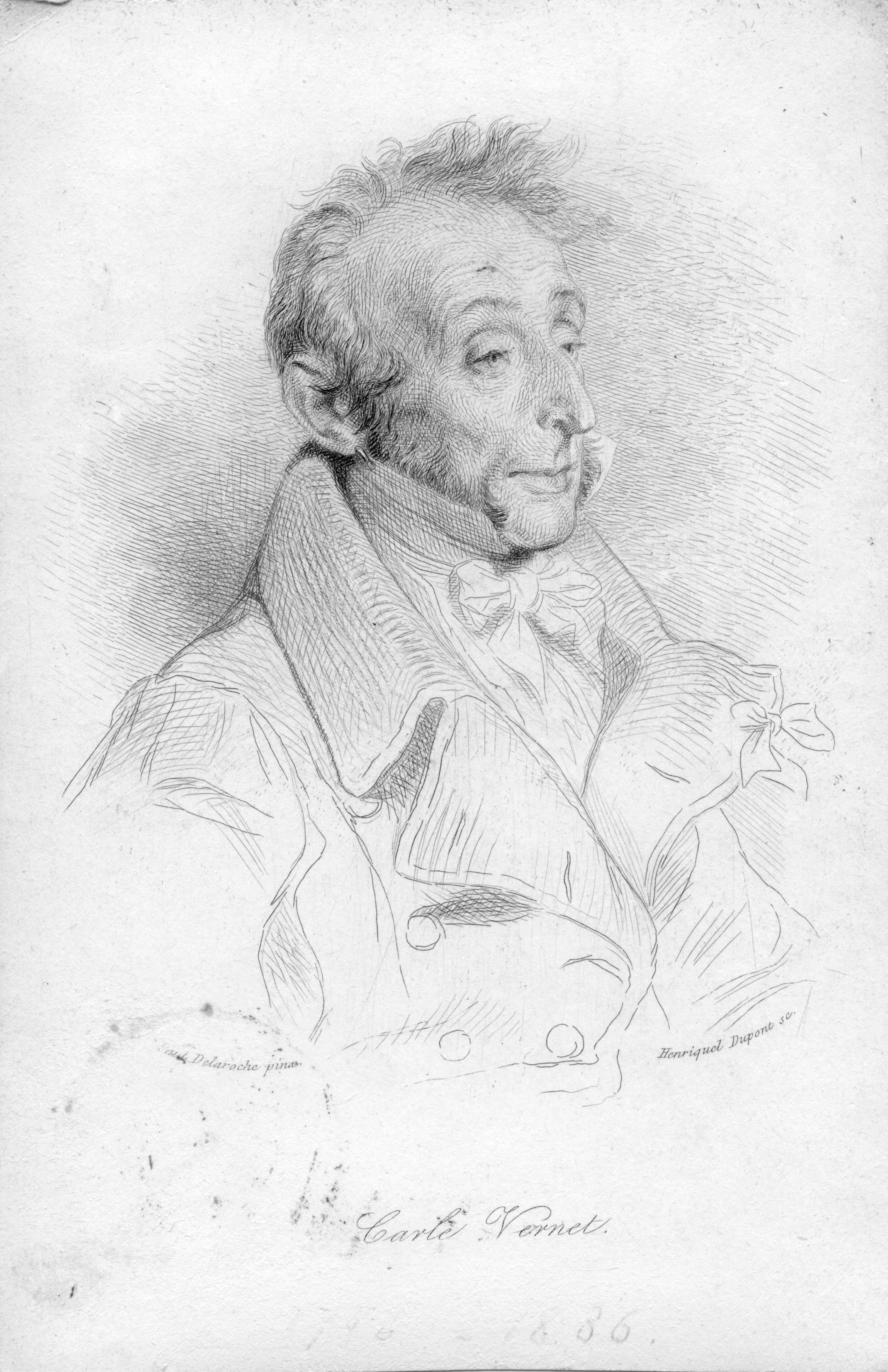 portrait gravé